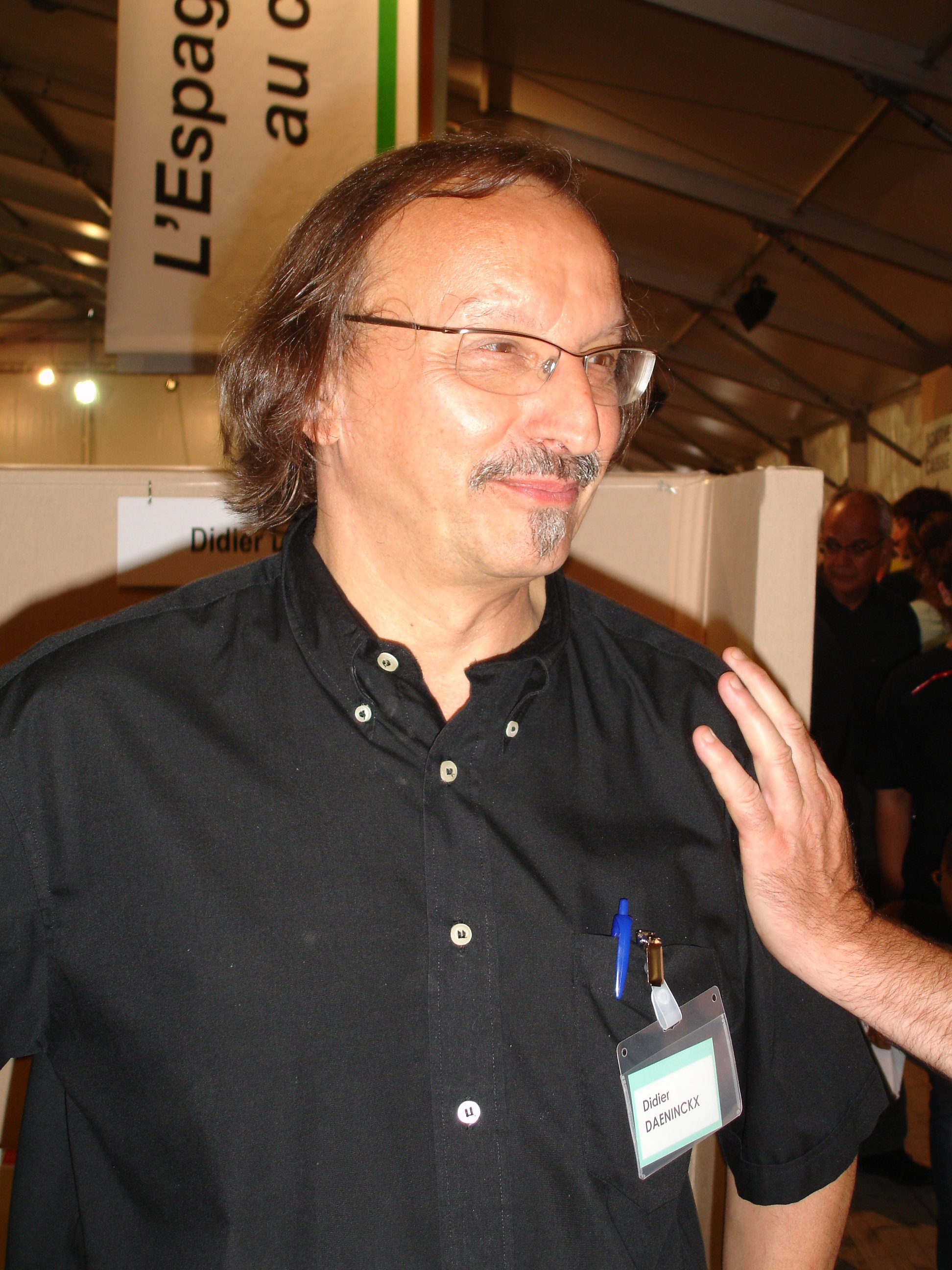 Didier Daeninckx signing books at Fête de l'Humanité 2006